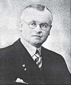 Max-Albert Van den Berg (1899-1945), juste parmi les nations - Yad Vashem. Résistant, il sauvera plus de 400 enfants juifs de la déportation.